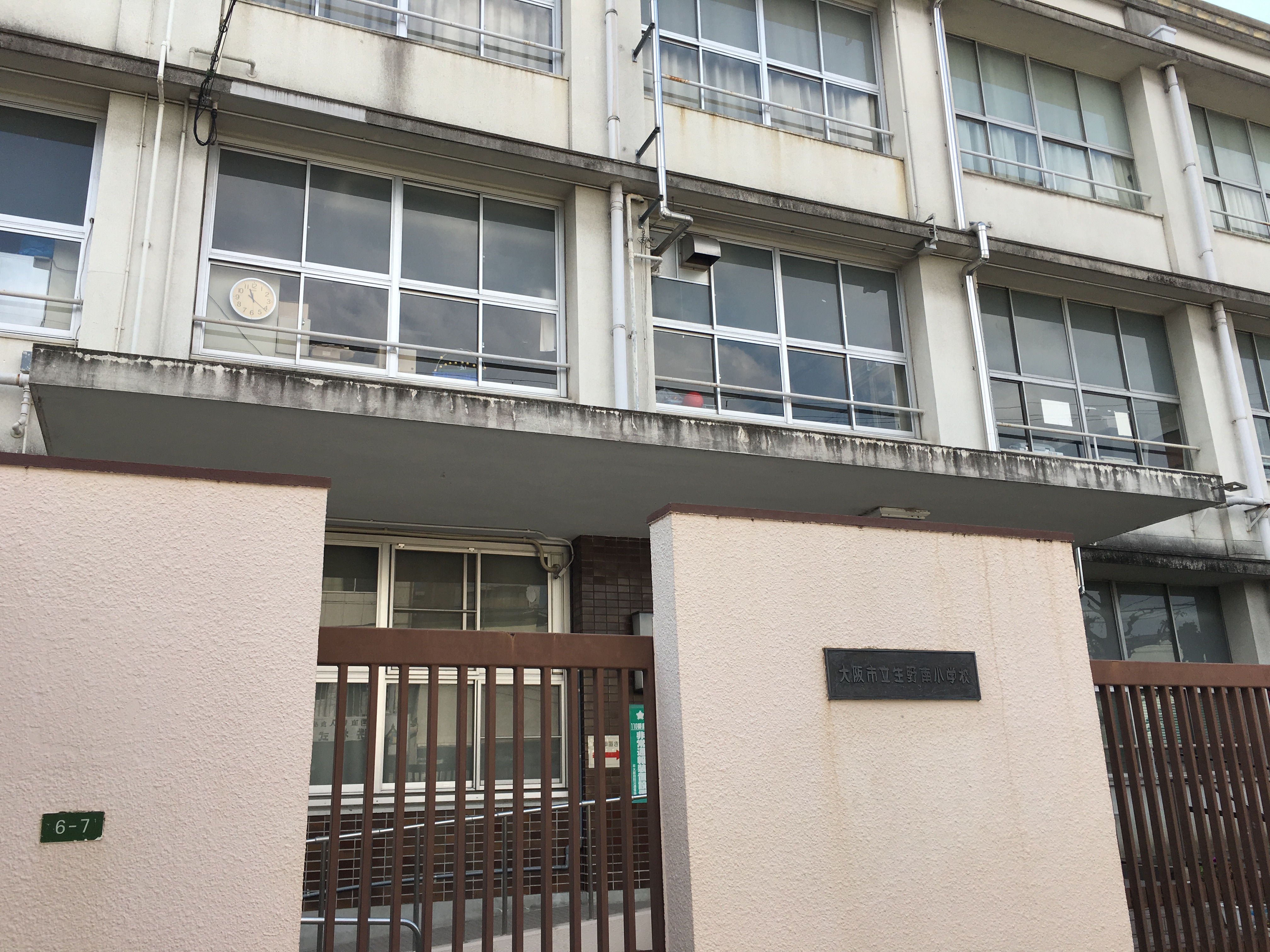 生野南小学校